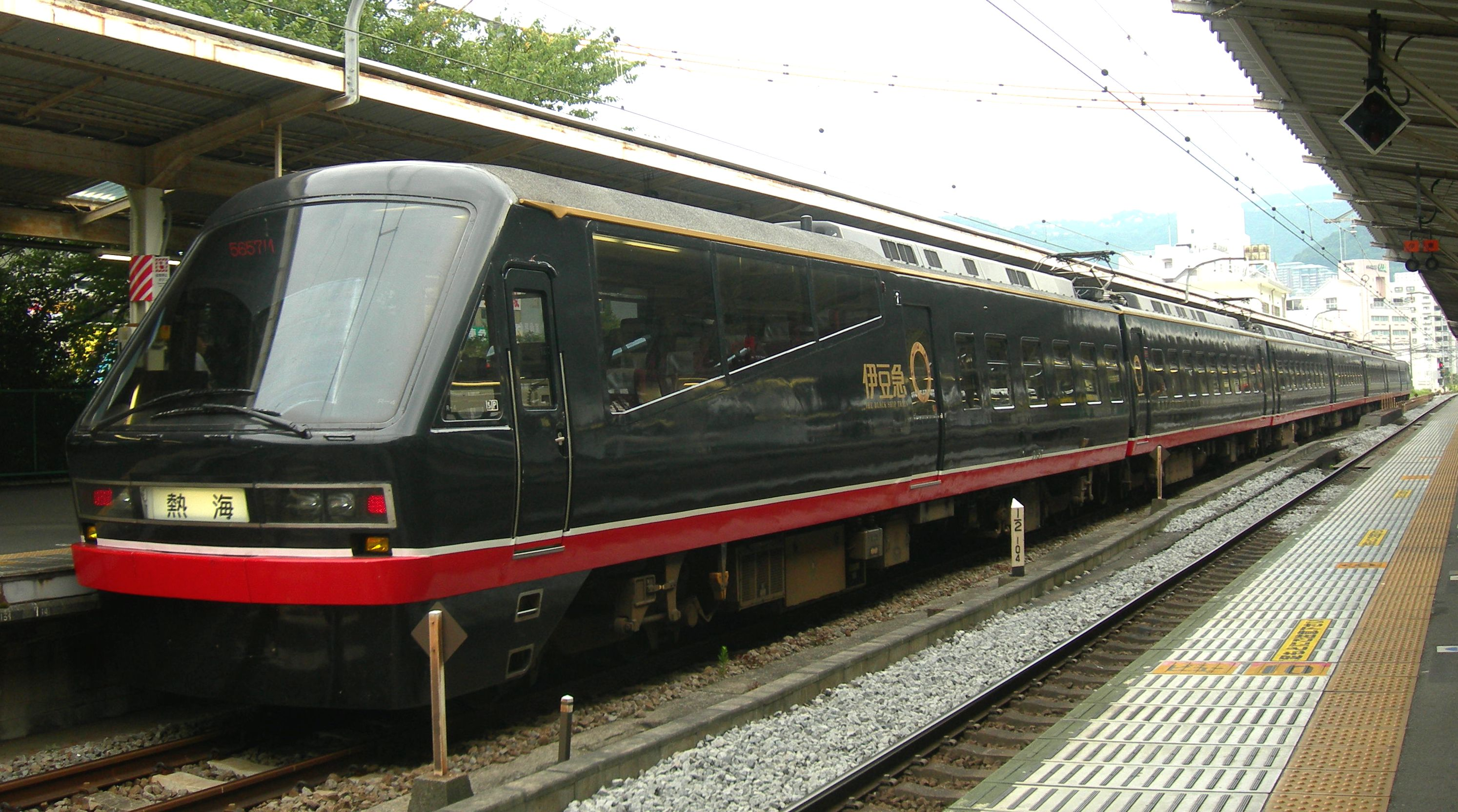 リゾート21黒船電車